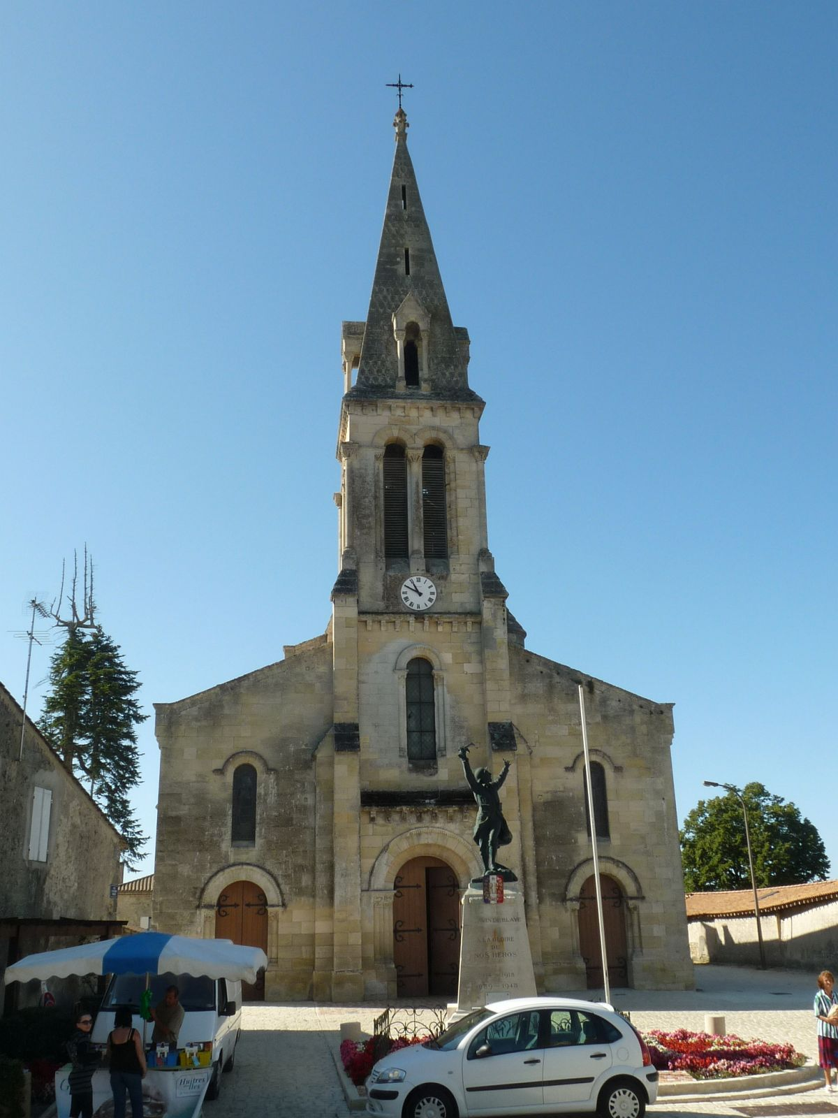 église de St-Savin (33), France.